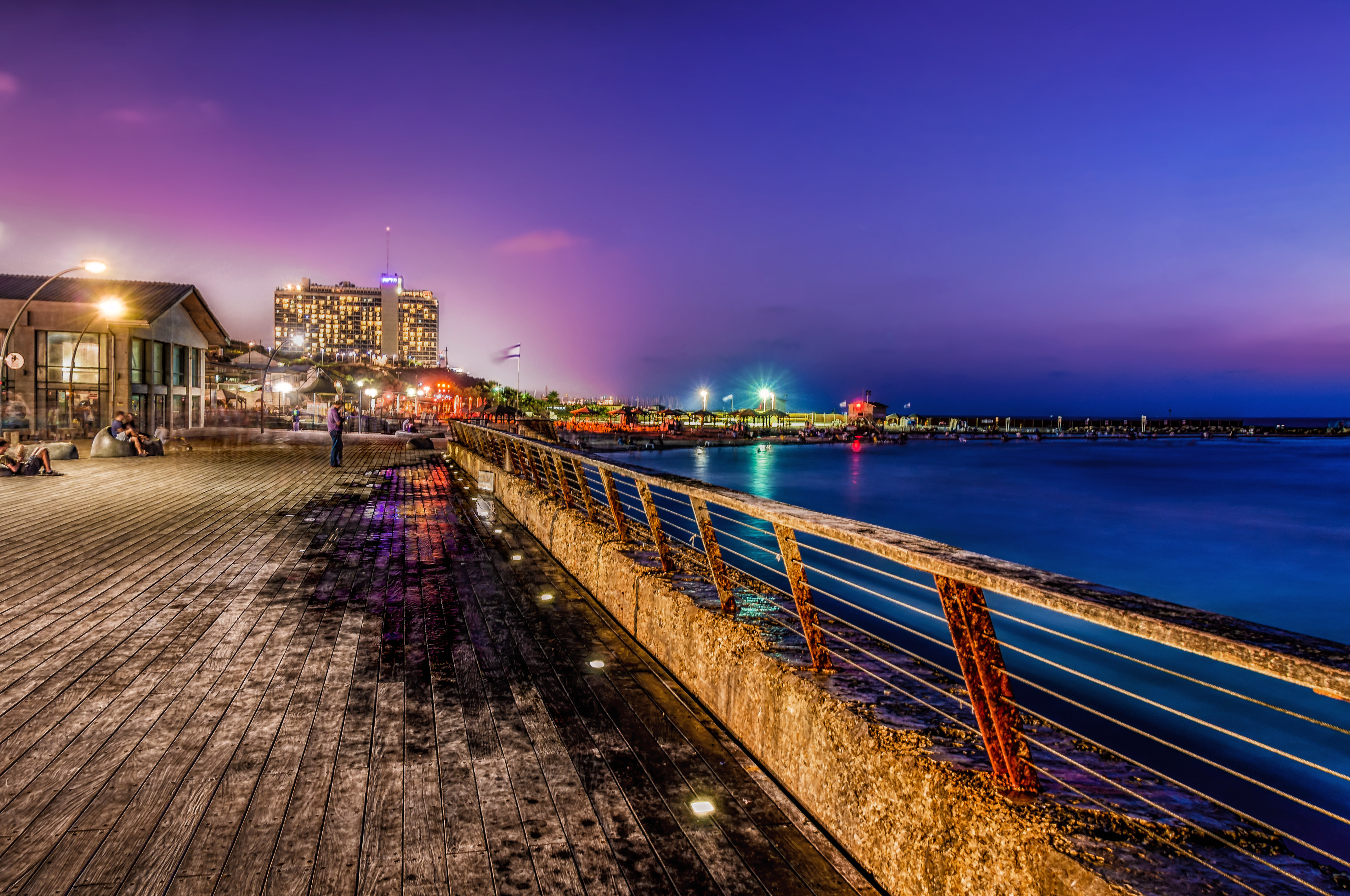 נמל תל אביב, הנמל העברי הראשון ב"עיר העברית הראשונה", ממוקם בצפון מערב העיר תל אביב. הנמל נפתח רשמית ב-23 בפברואר 1938, האוניה האחרונה הגיעה לנמל תל אביב ביום 25 באוקטובר 1965 עבודות הפריקה והטעינה הופסקו ב-3 בנובמבר 1965, בעקבות פתיחתו של נמל אשדוד. אזור המעגן הישן משמש כיום כמרכז בילויים.